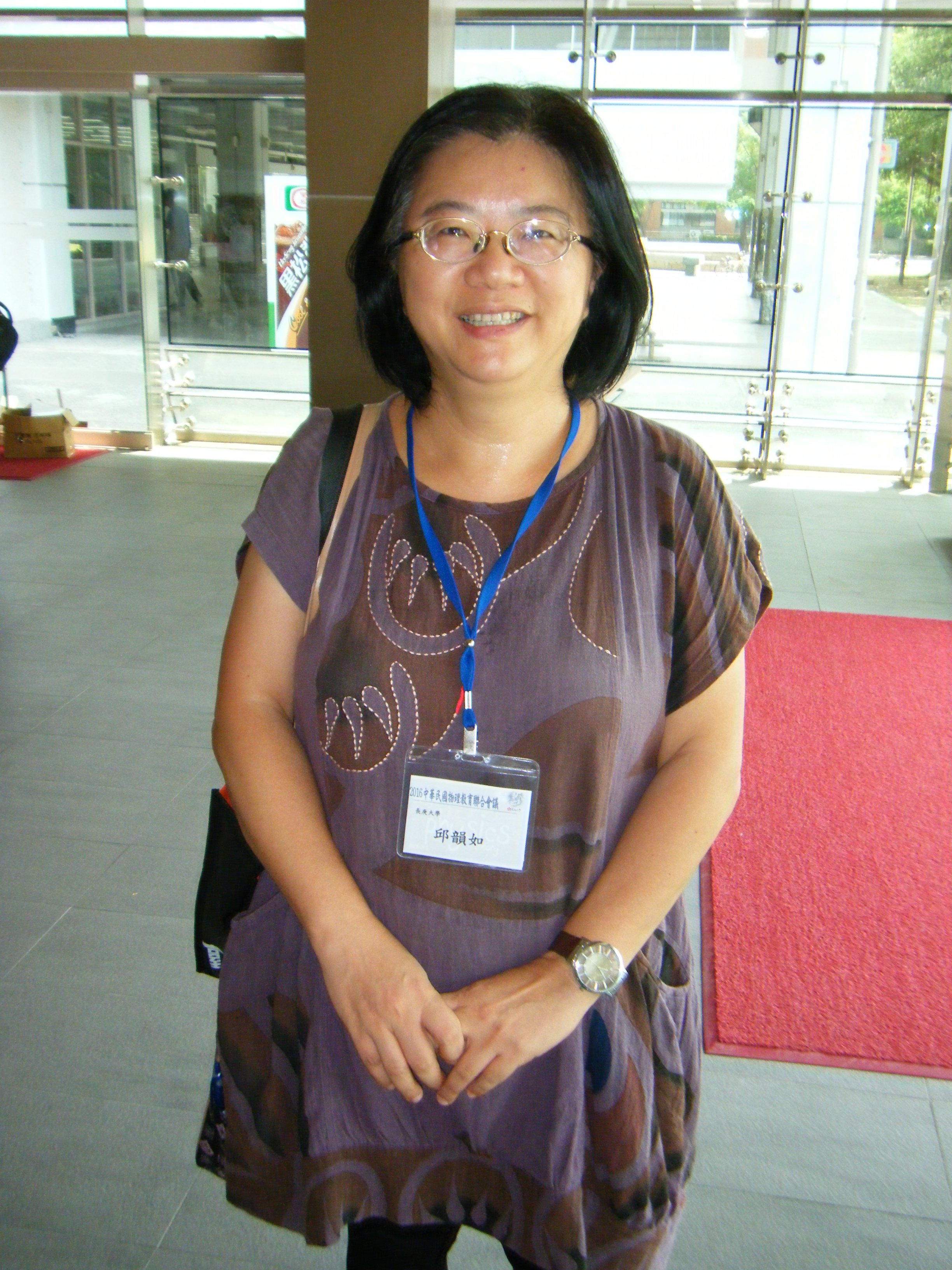 長庚大學通識教育中心教授邱韻如於國立成功大學國際會議中心留影